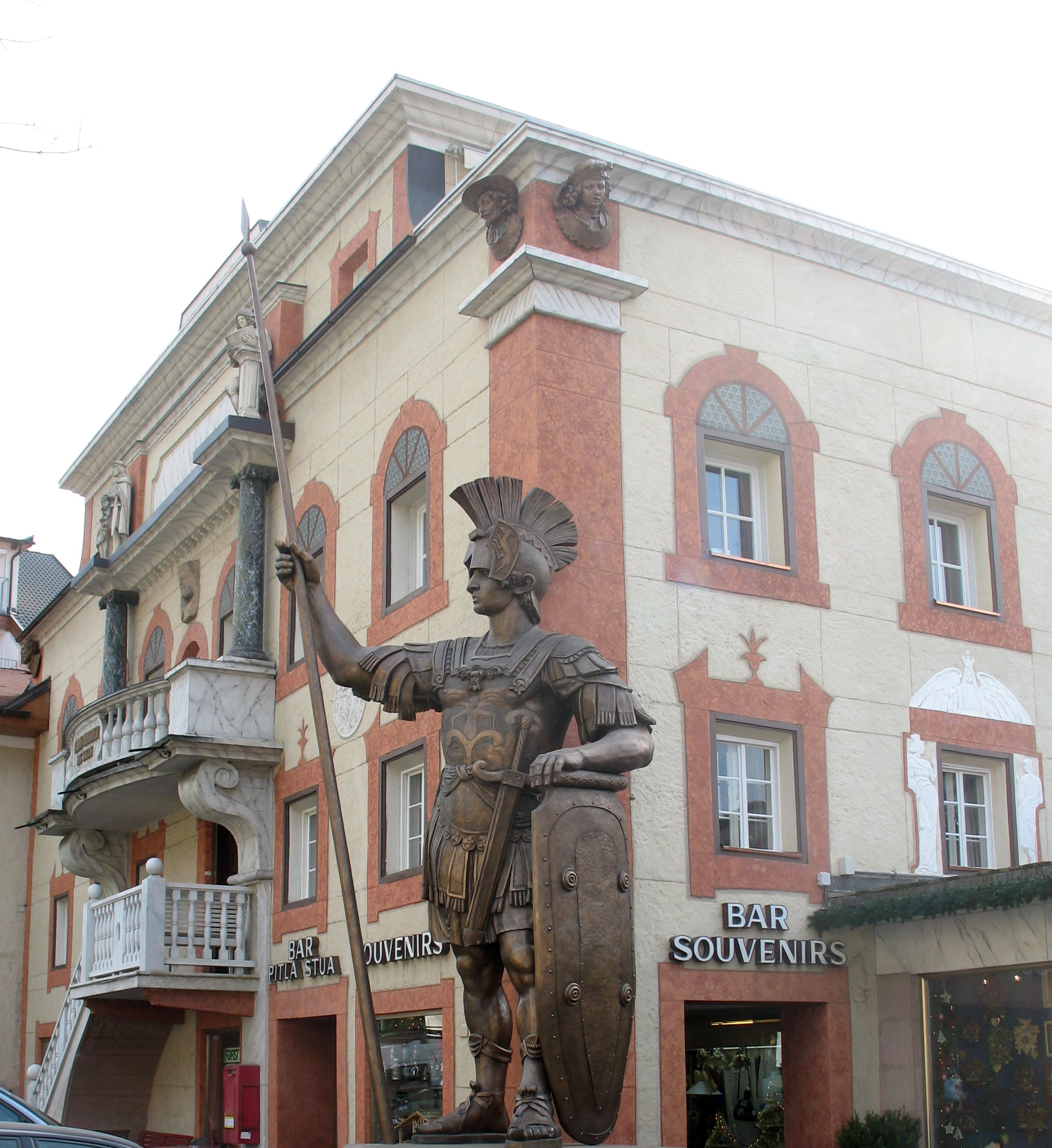 Villa Venezia with sculptures by Johann Baptist Moroder-Lusenberg (1870 – 1932) in St. Ulrich in Gröden - Ortisei Val Gardena